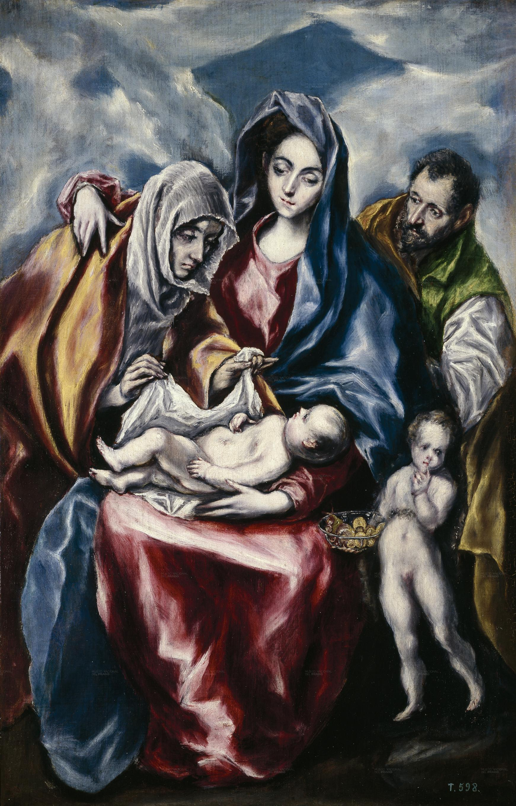 La obra representa a los tres miembros de la Sagrada Familia cristiana junto a Santa Ana, la madre de la Virgen María, y el pequeño San Juan Bautista.